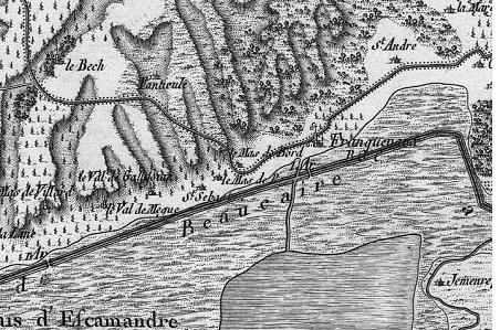 Carte Cassini du hameau de Franquevaux Re-constitution de la carte par collage : R. BENEZET